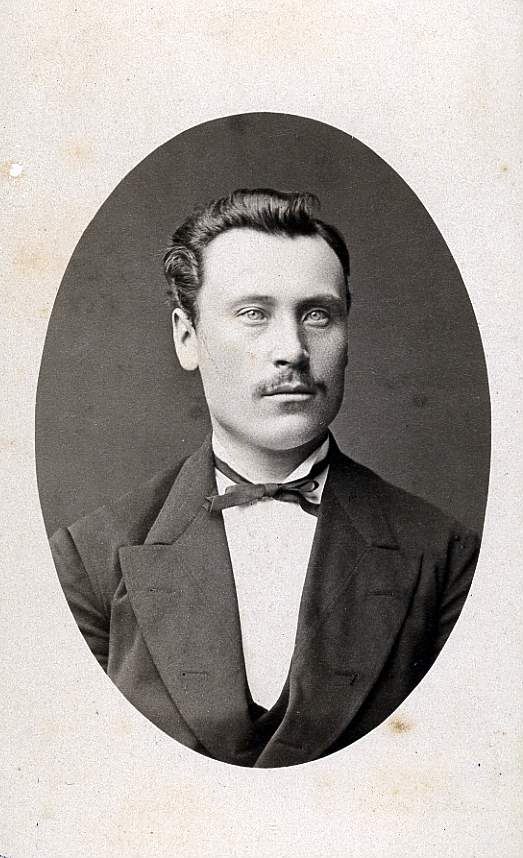 Michał Čoch (1851–1922)